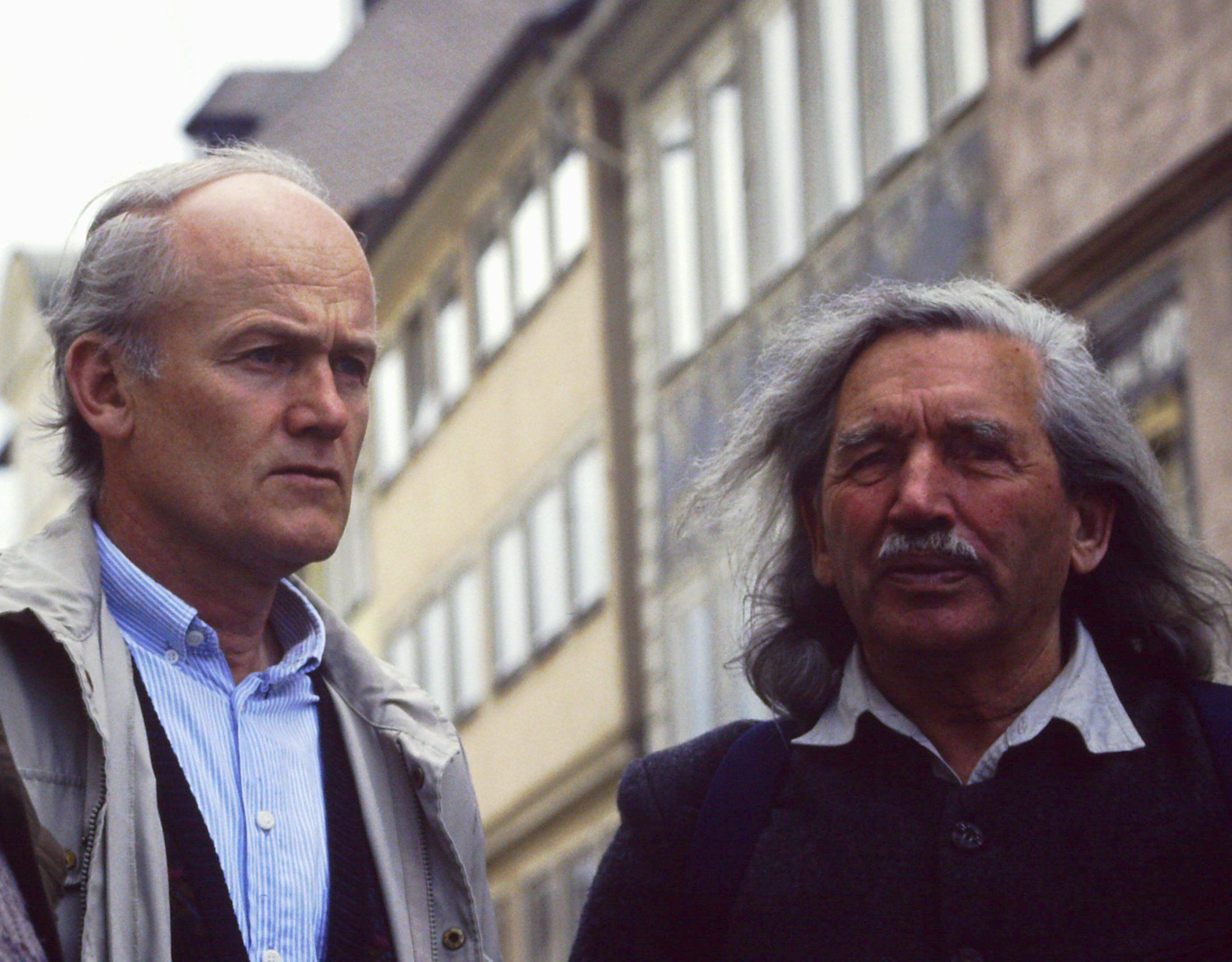 Ludwig Sothmann (links), Vorsitzender des Landesbund für Vogelschutz in Bayern e.V., und Karl Partsch (rechts), "Alpenindianer" und zum Zeitpunkt des Fotos Abgeordneter im Europaparlament, Coburg, Bayern, Deutschland, Juni 1994